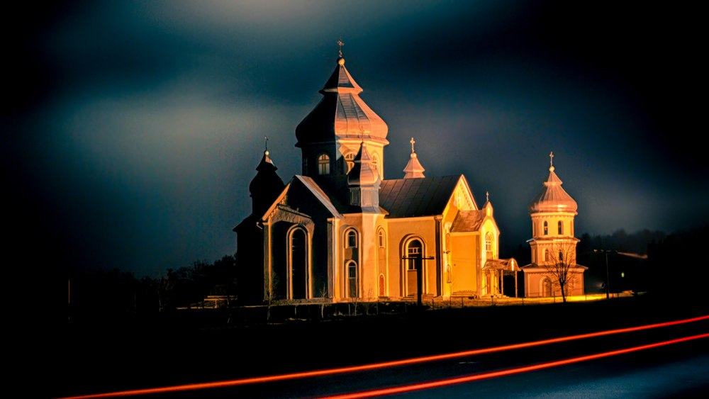 Церква Архистратига Михаїла, с. Гвізд Надвірнянського району